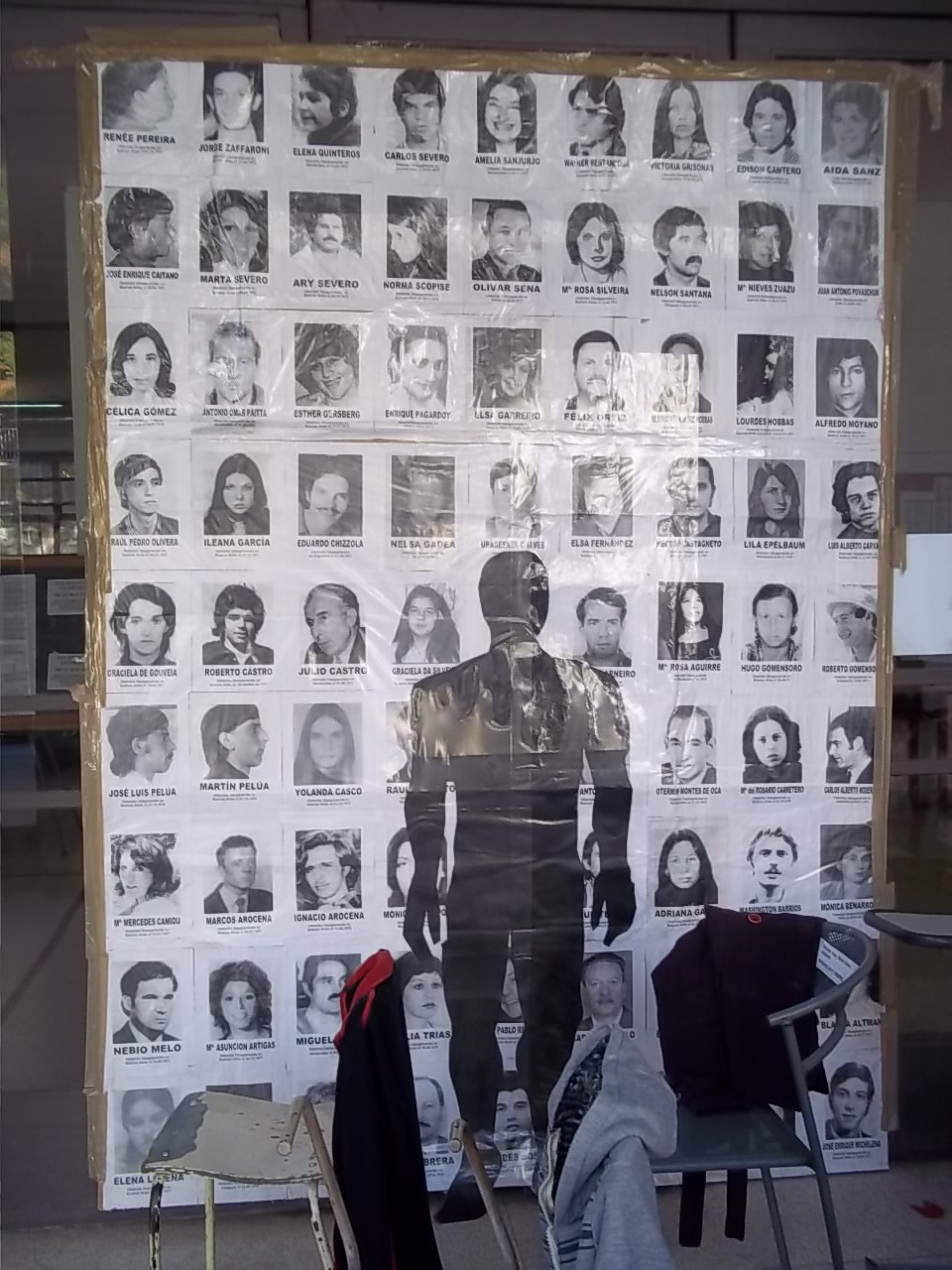 Homenaje por parte del gremio de estudiantes a los Detenidos Desaparecidos en el Instituto de Profesores Artigas